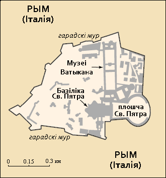 Карта Ватыкана